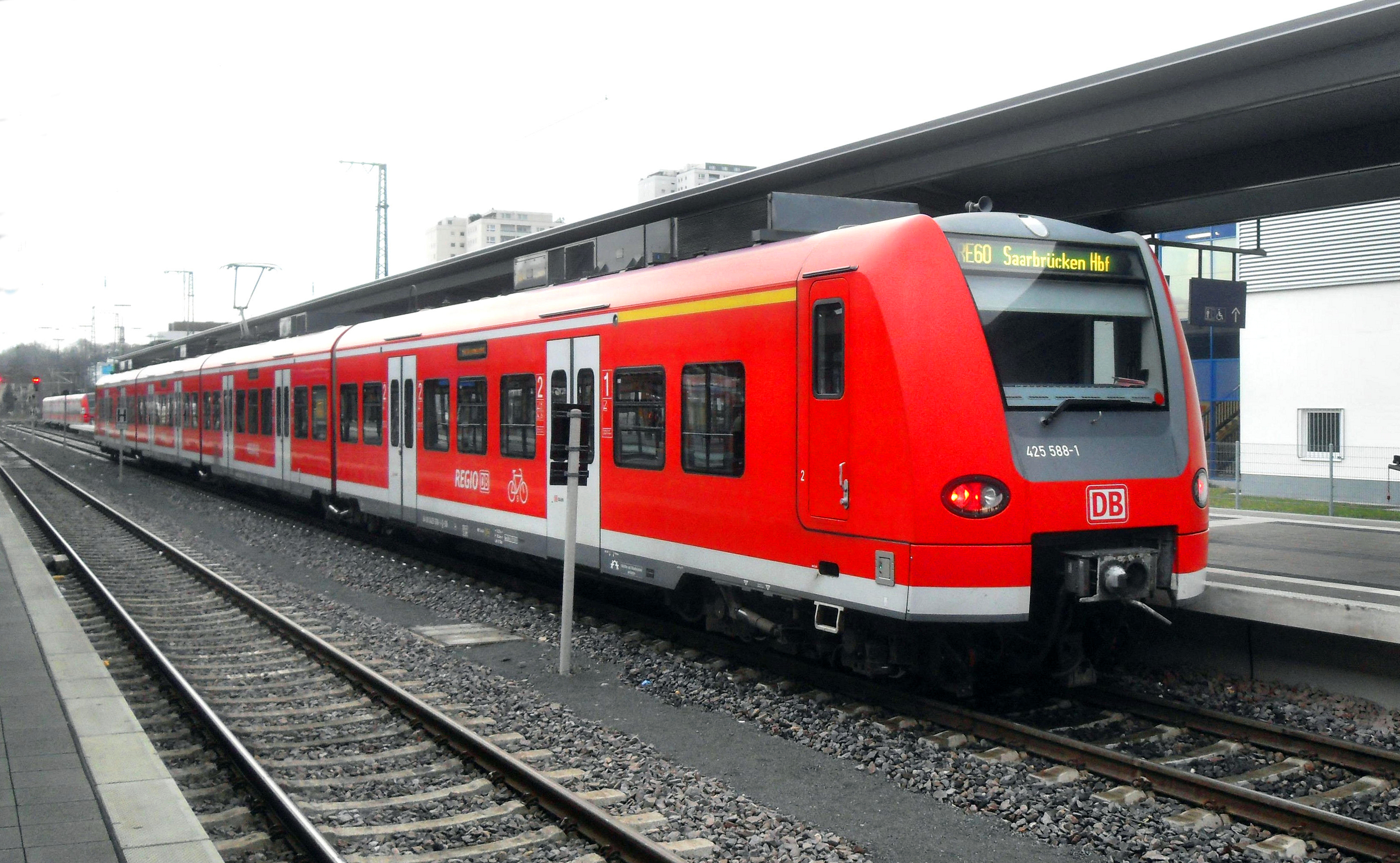 RegionalExpress der Baureihe 425 im Kaiserslauterner Hauptbahnhof auf dem Weg nach Saarbrücken über die Pfälzische Ludwigsbahn